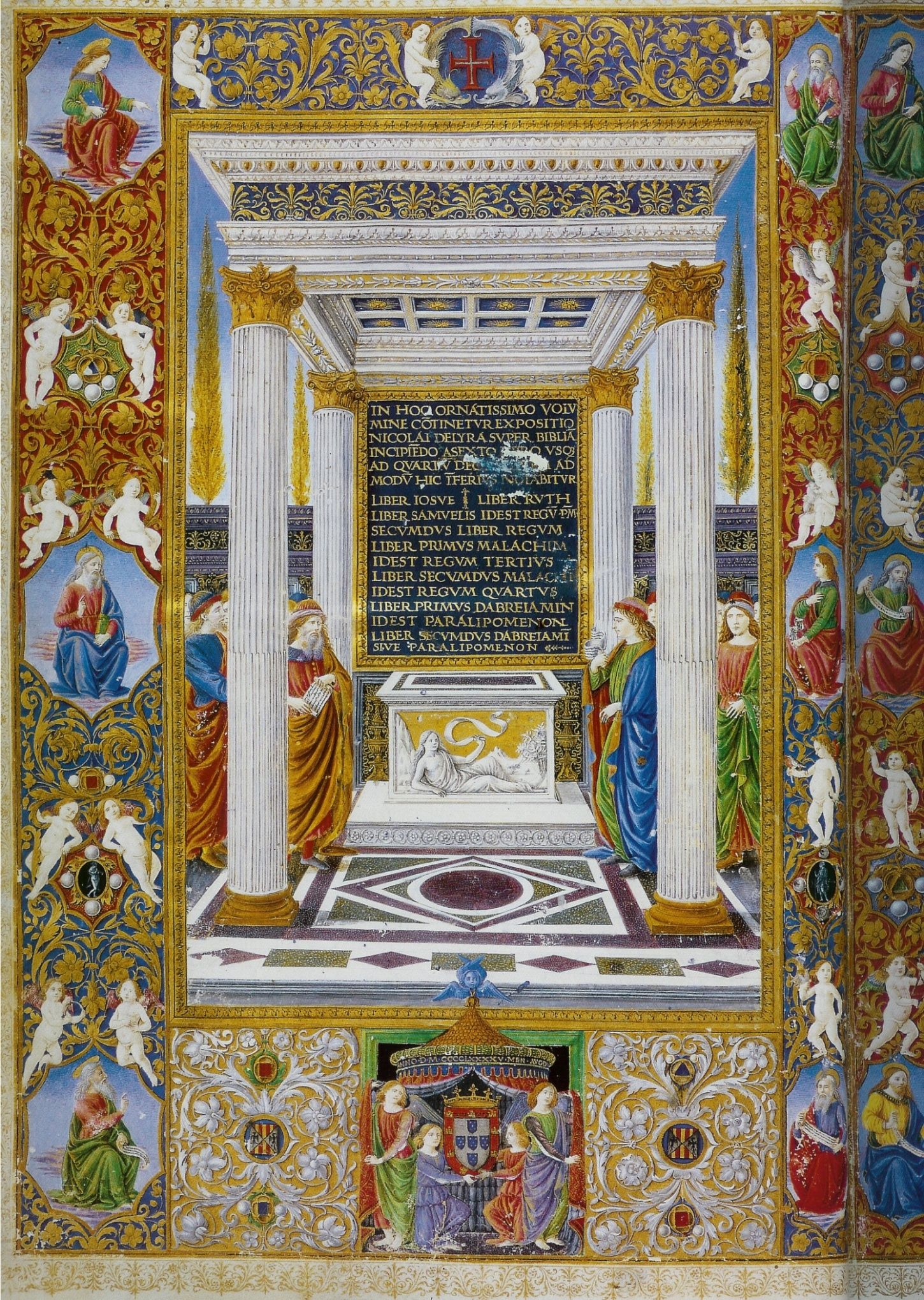 Bíblia dos Jerónimos, frontispício do volume II, do livro de Josué